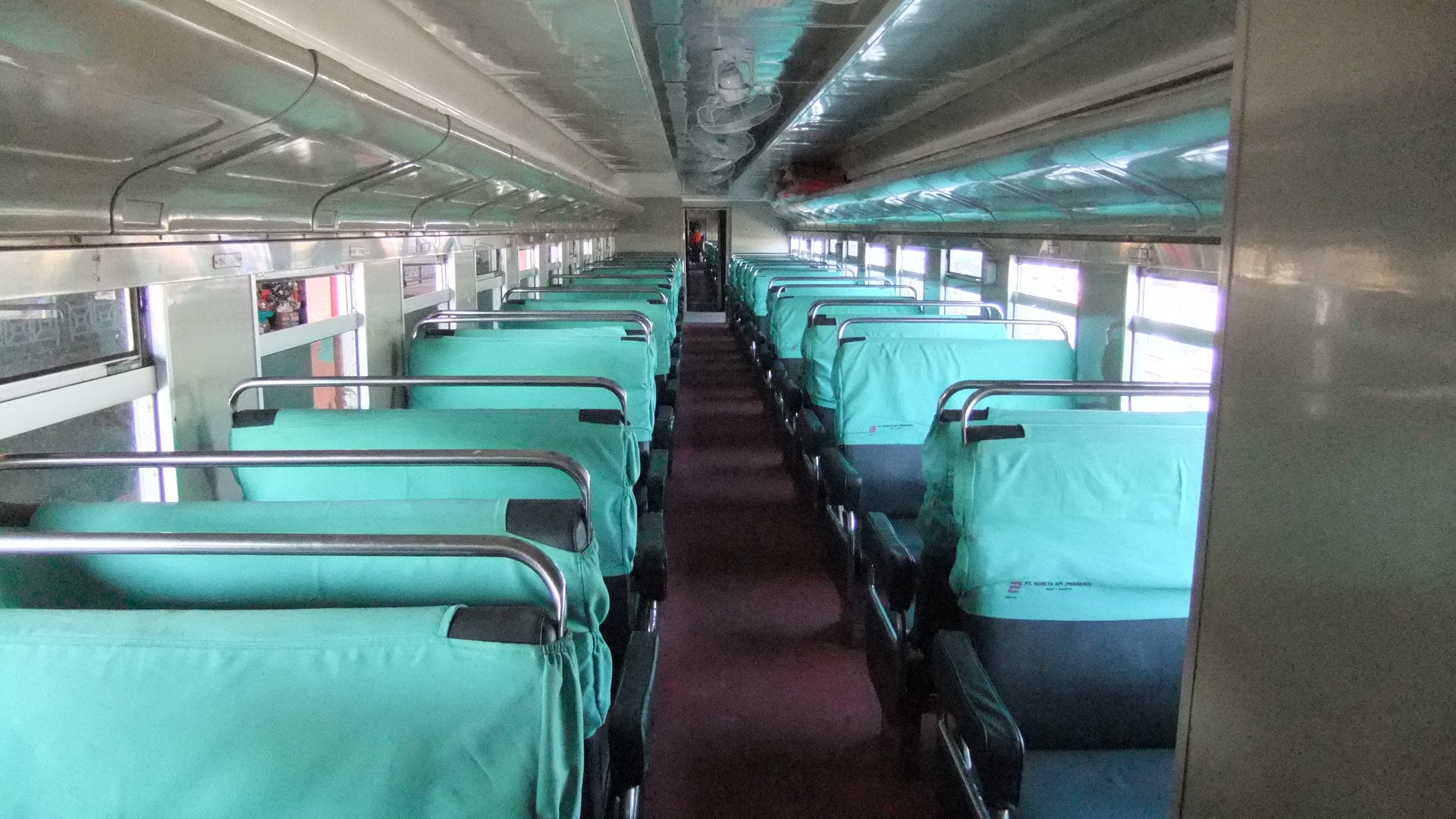 Kereta Api Gumarang Kelas Bisnis